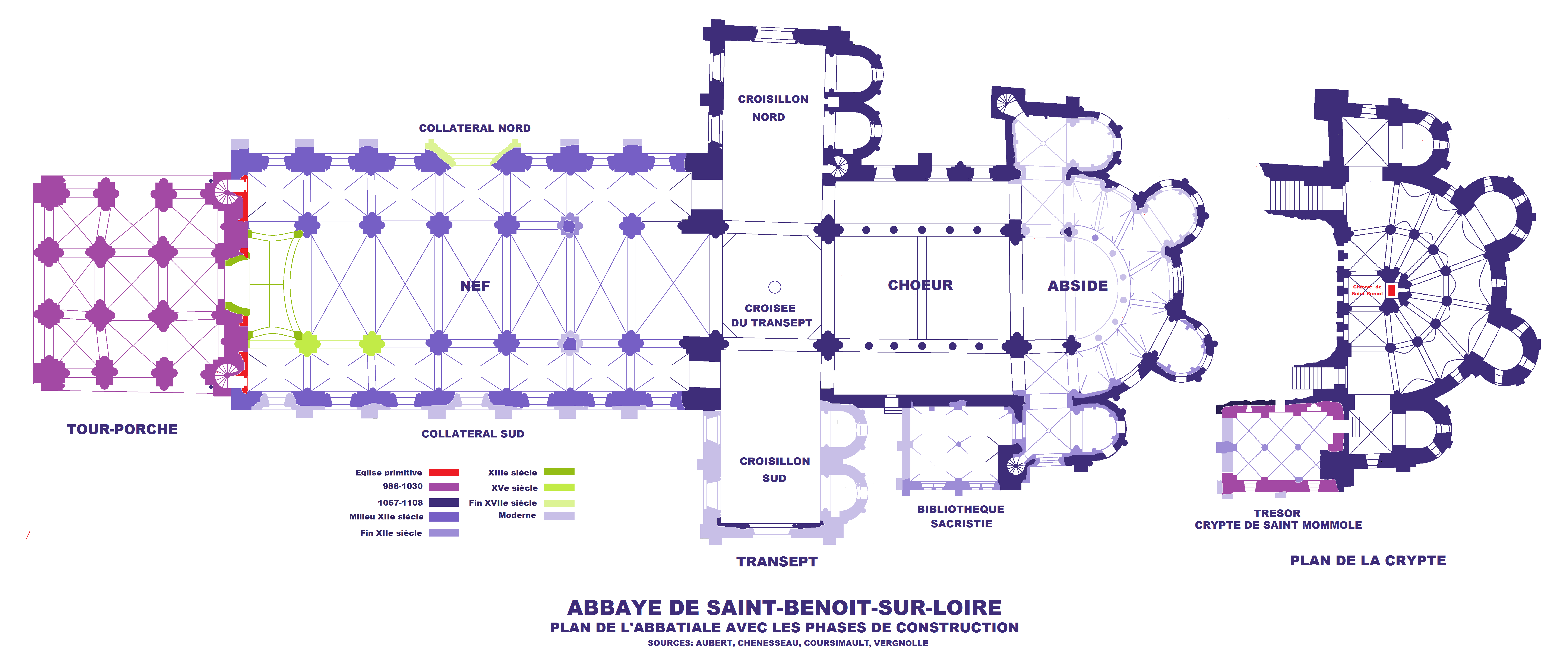 Abbaye de Saint-Benoît-sur-Loire (45) Plan avec phases de construction